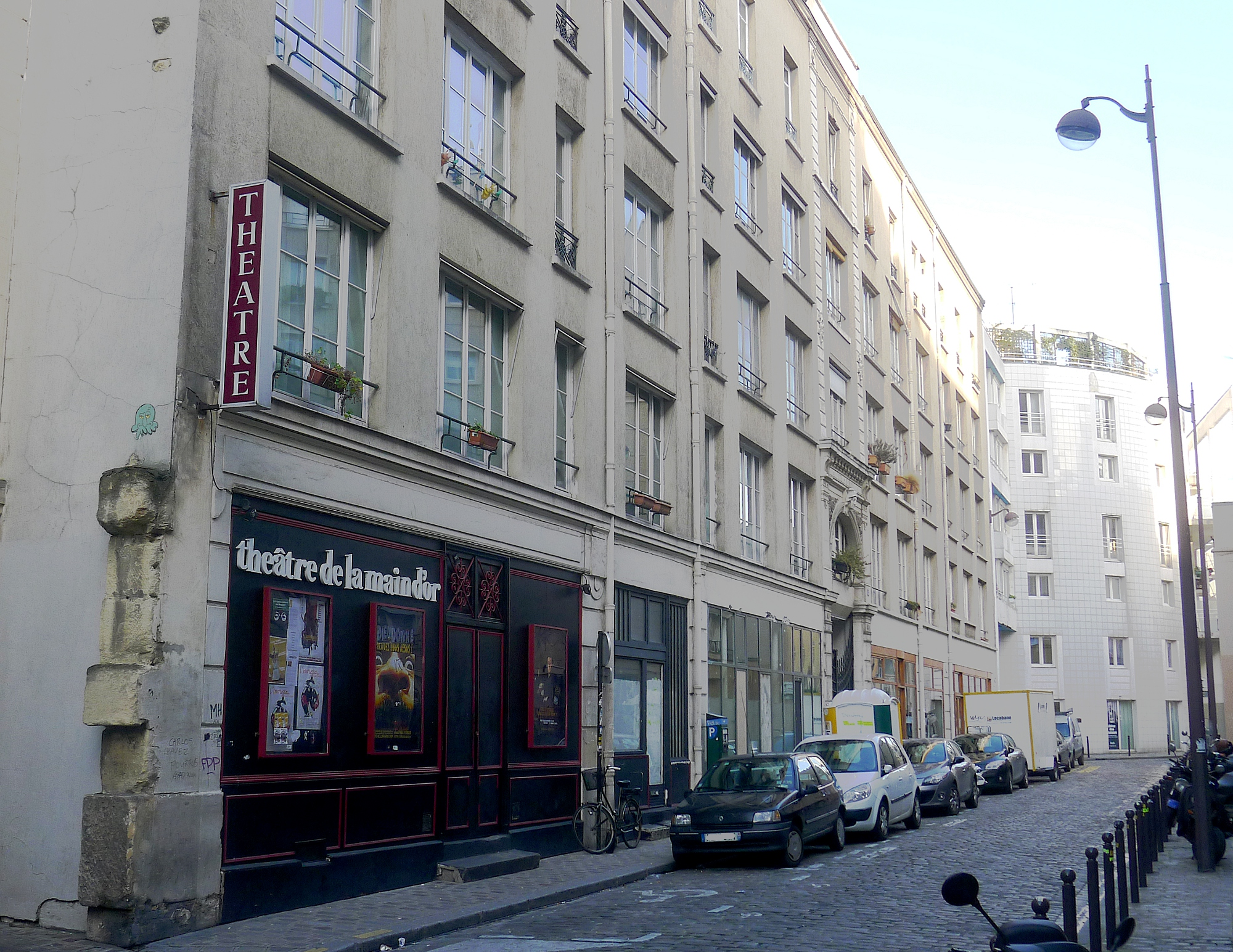 Passage de la Main-d'Or - Paris XI